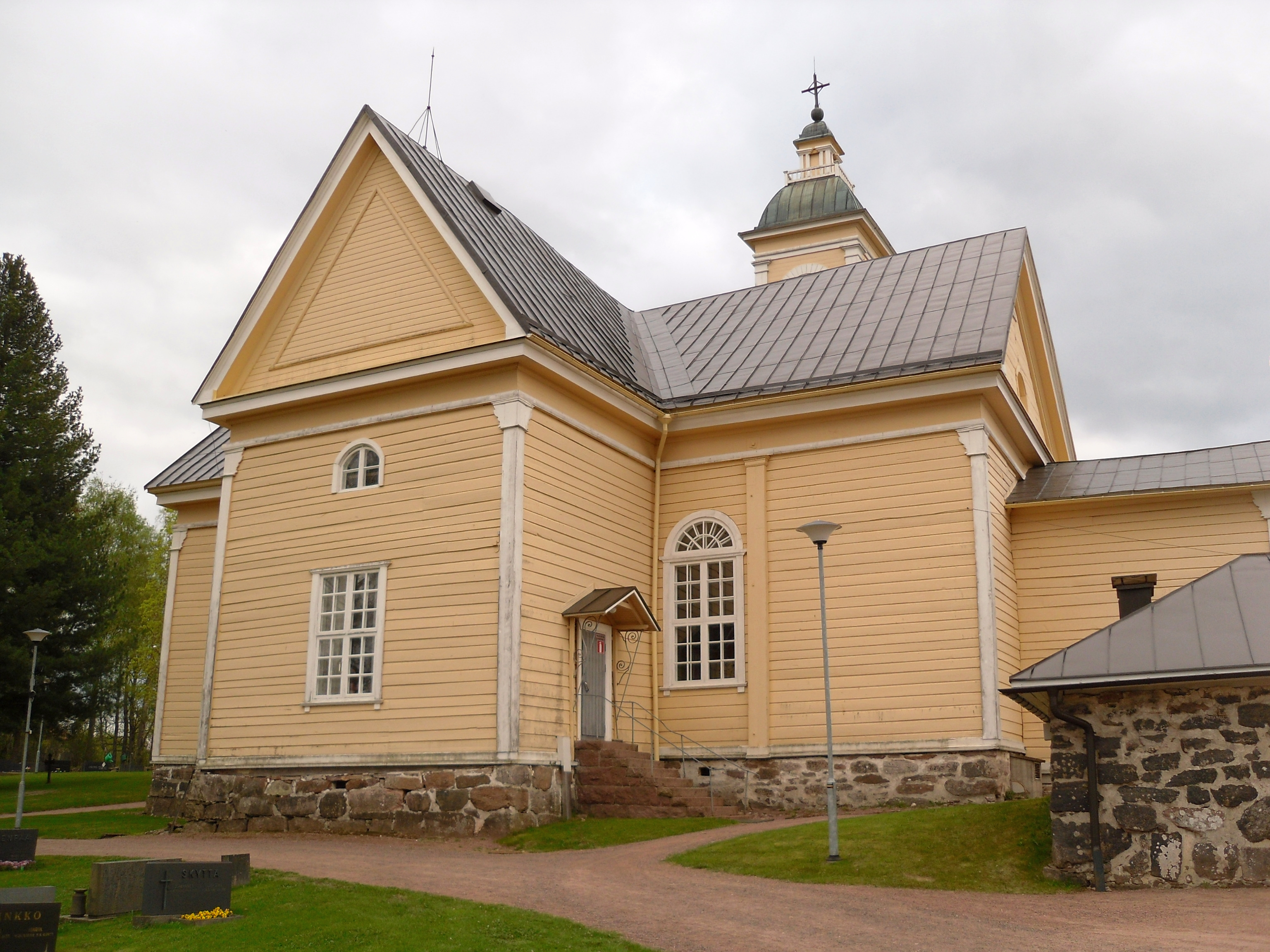 Kiukaisten kirkko hautausmaan suunnasta kuvattuna